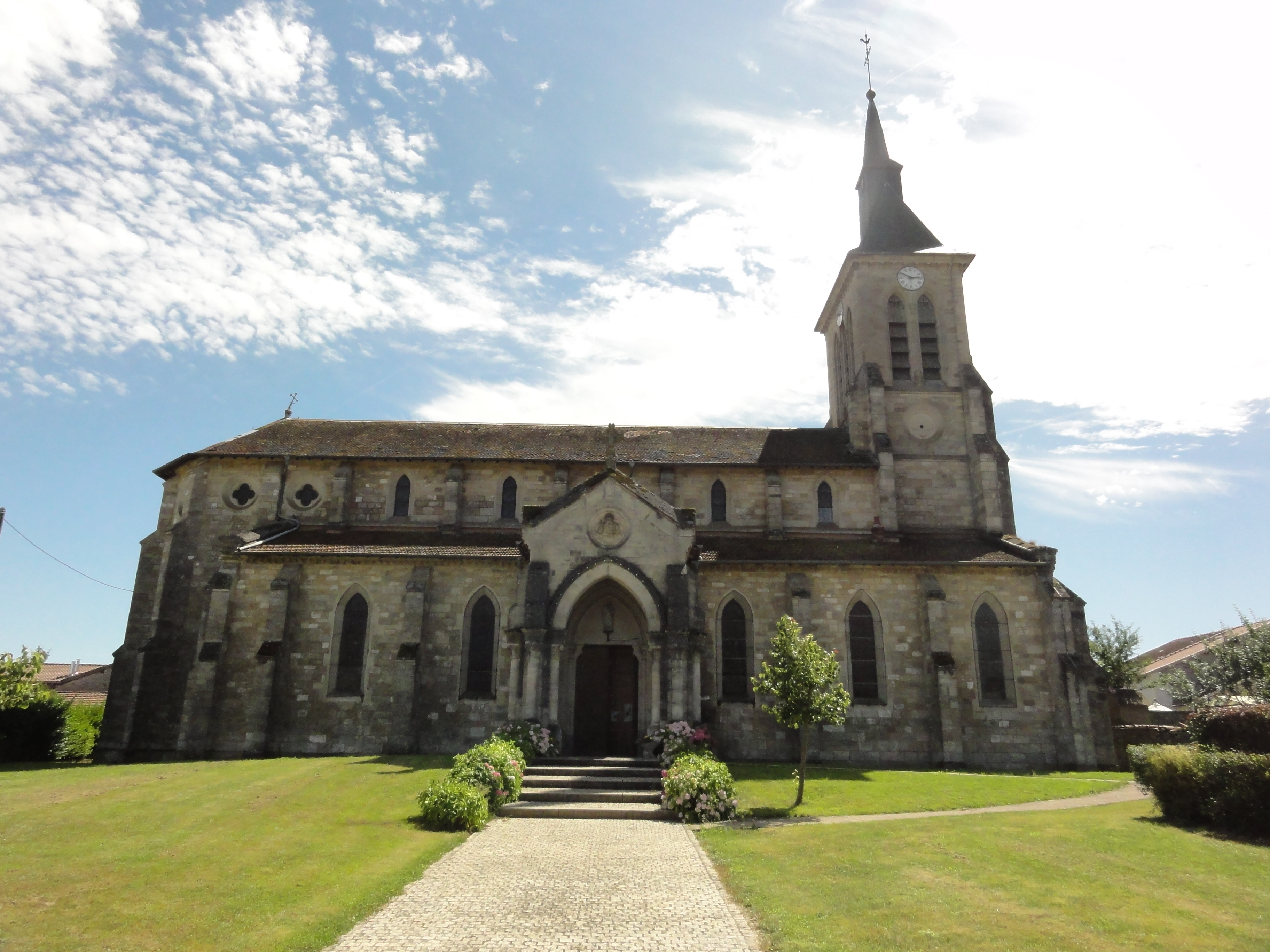 Morley (Meuse) église